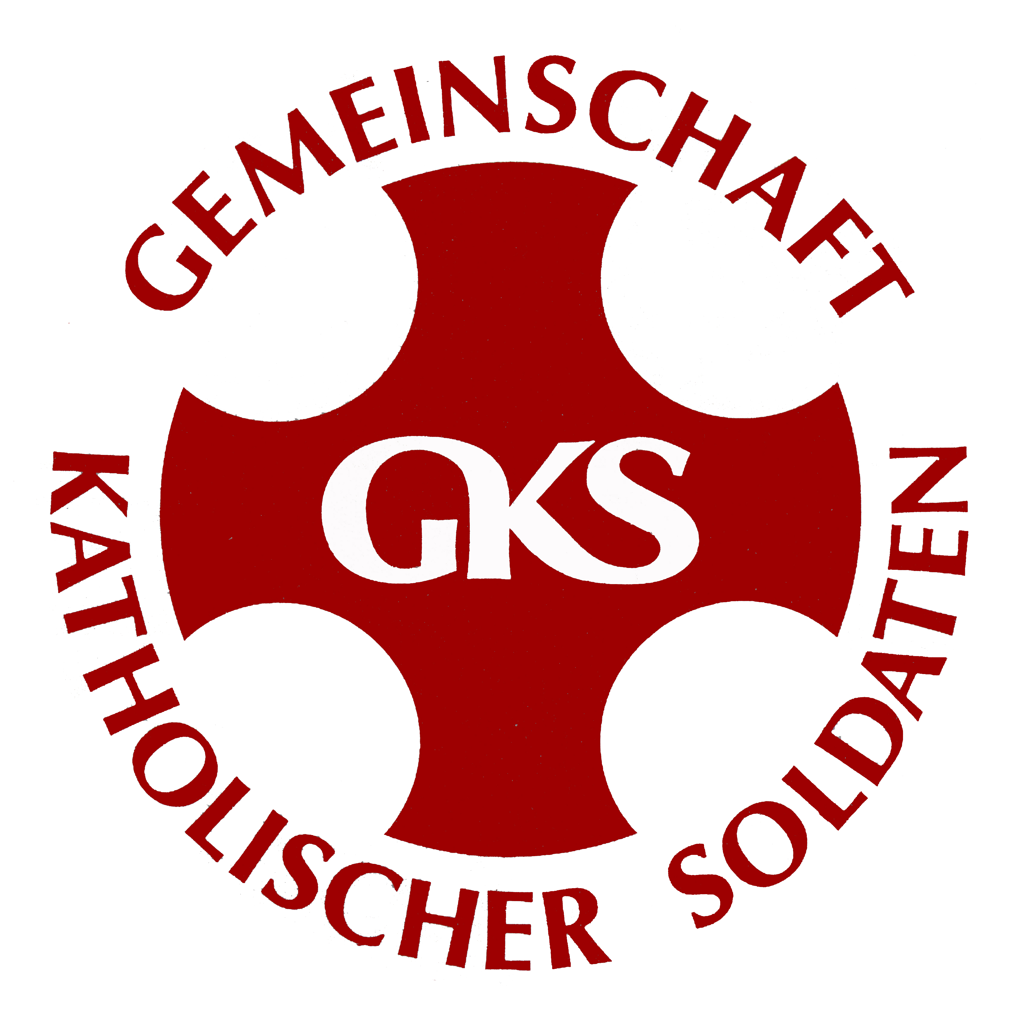 Das Kreuz der GKS erstellt durch H.Jermer